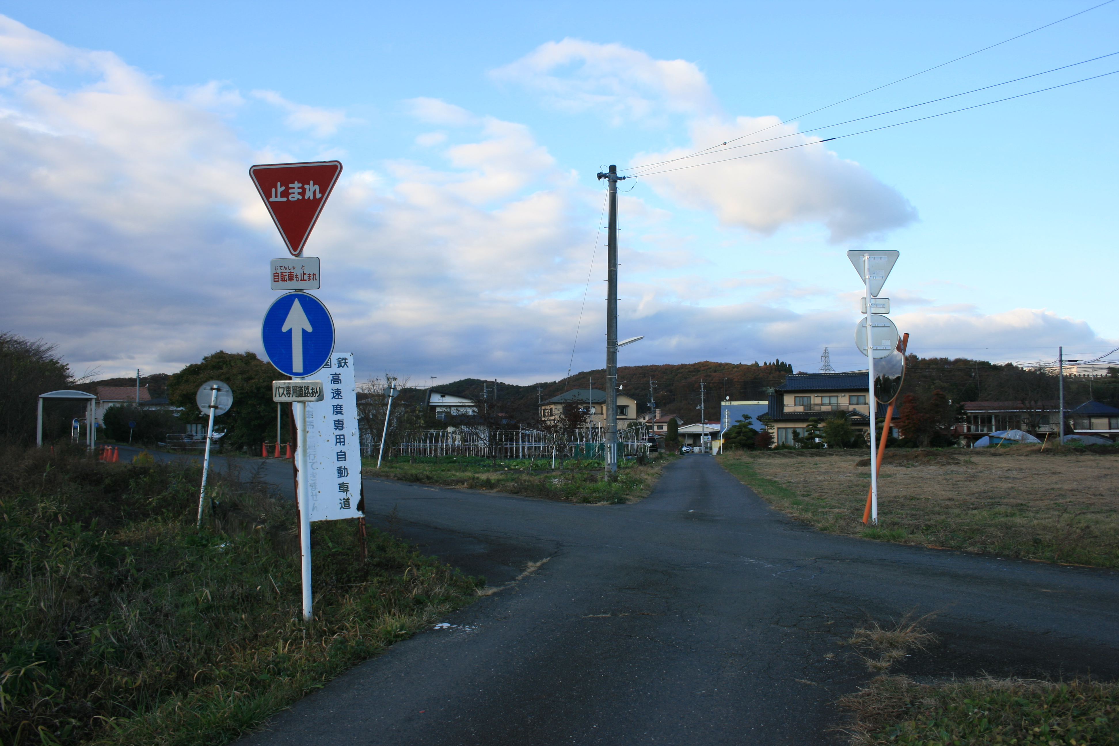 JRバス関東白棚線 バス専用道路と福島県道388号白坂関辺線交点にて。